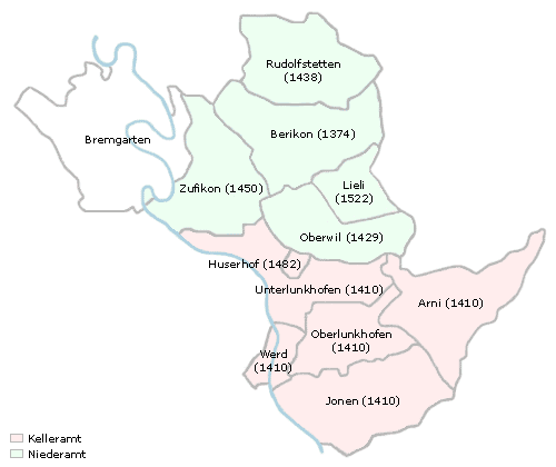 Karte des Kelleramts und des Niederamts, wo die Stadt Bremgarten bis 1798 die niedere Gerichtsbarkeit besass